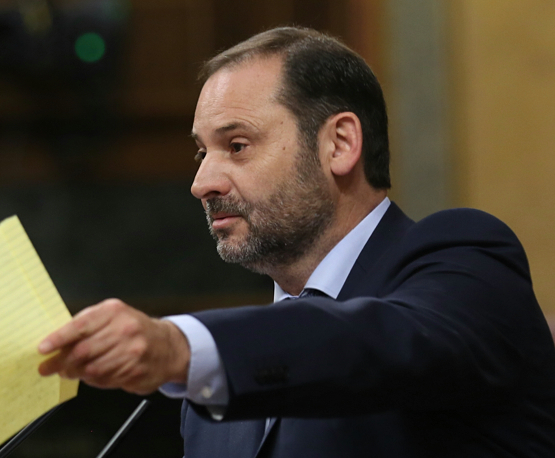 José Luis Ábalos intervient à la tribune du Congrès des députés lors de la motion de censure du 16 juin 2017.